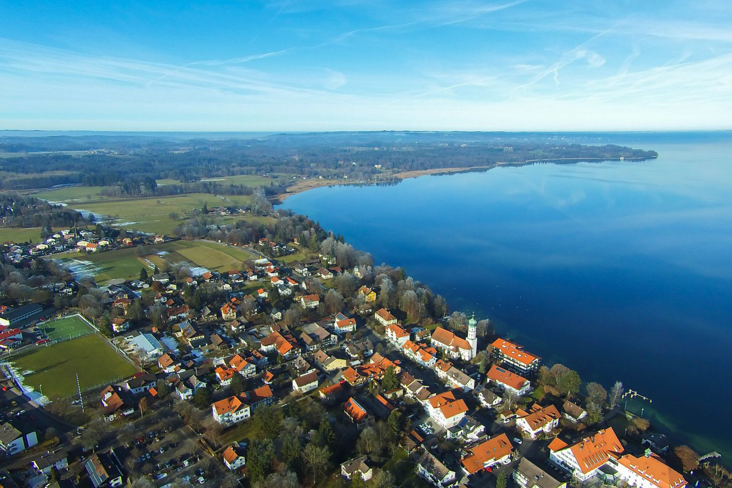 Dieses Luftbild von Seeshaupt am Starnbeger See wurde im Winter aufgenommen.